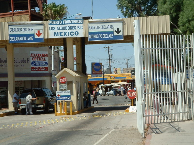 Paso fronterizo en Los Algodones, Baja California